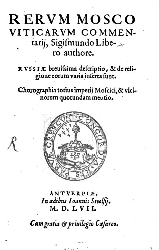 Обложка книги Записки о Московии (лат. Rerum Moscoviticarum Commentarii)